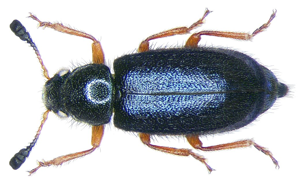 Familie: Cleridae Groesse: 4-5,5 mm Verbreitung: Europa Ökologie: an trockenem Aas, Knochen, Fellen, Nahrungsmitteln Fundort: Germania, Bayern, Oberfranken, Selbitz leg.det. U.Schmidt, 1999 Photo: U.Schmidt, 2007